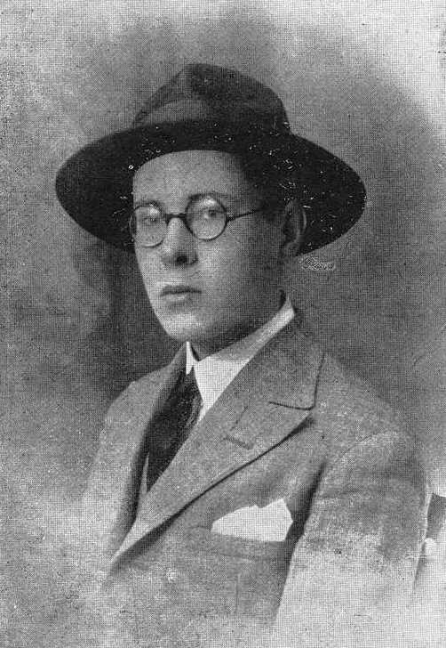 Francisco Luís Bernárdez, fotografía en Vida Gallega 1922